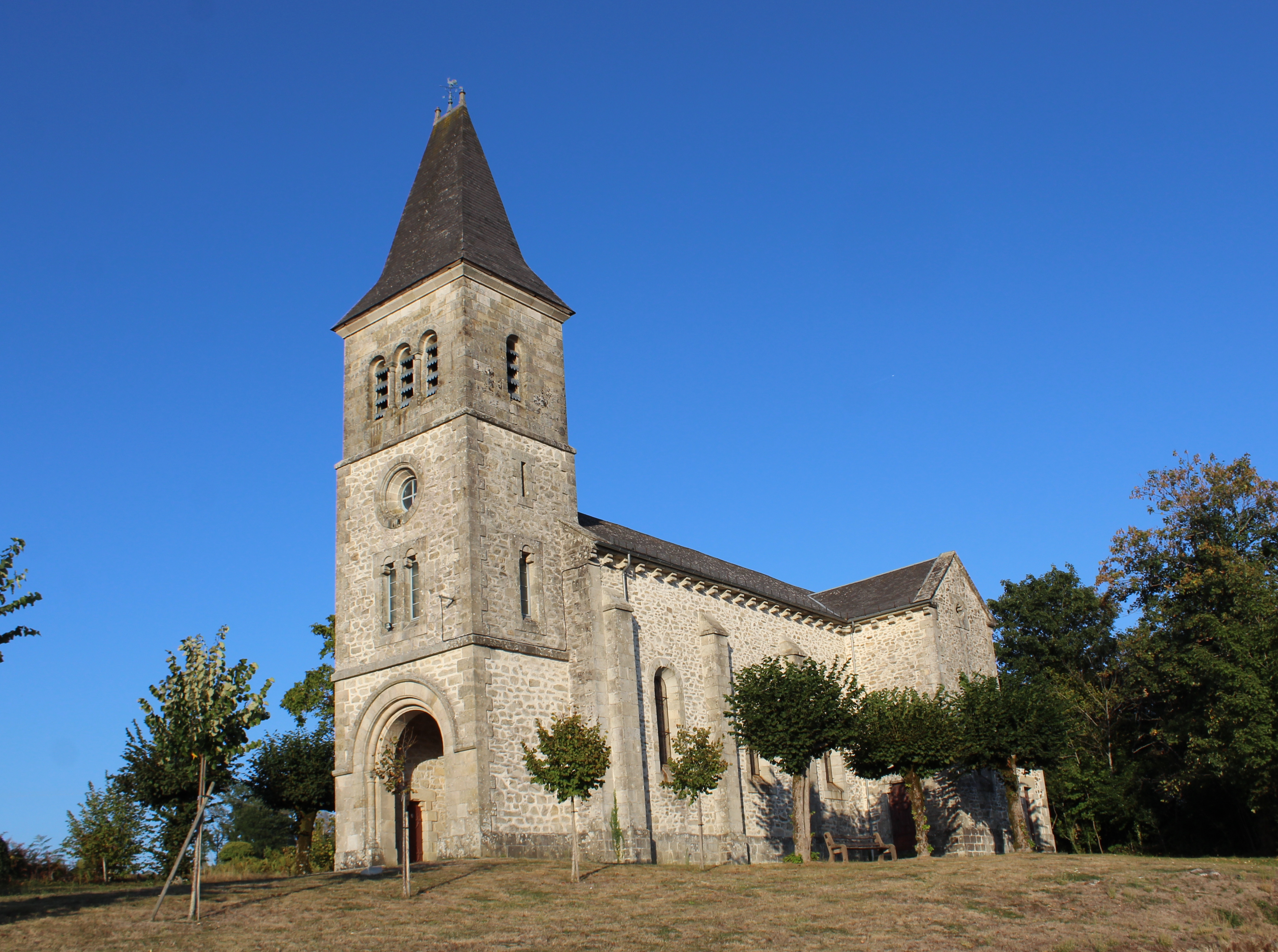 L'église